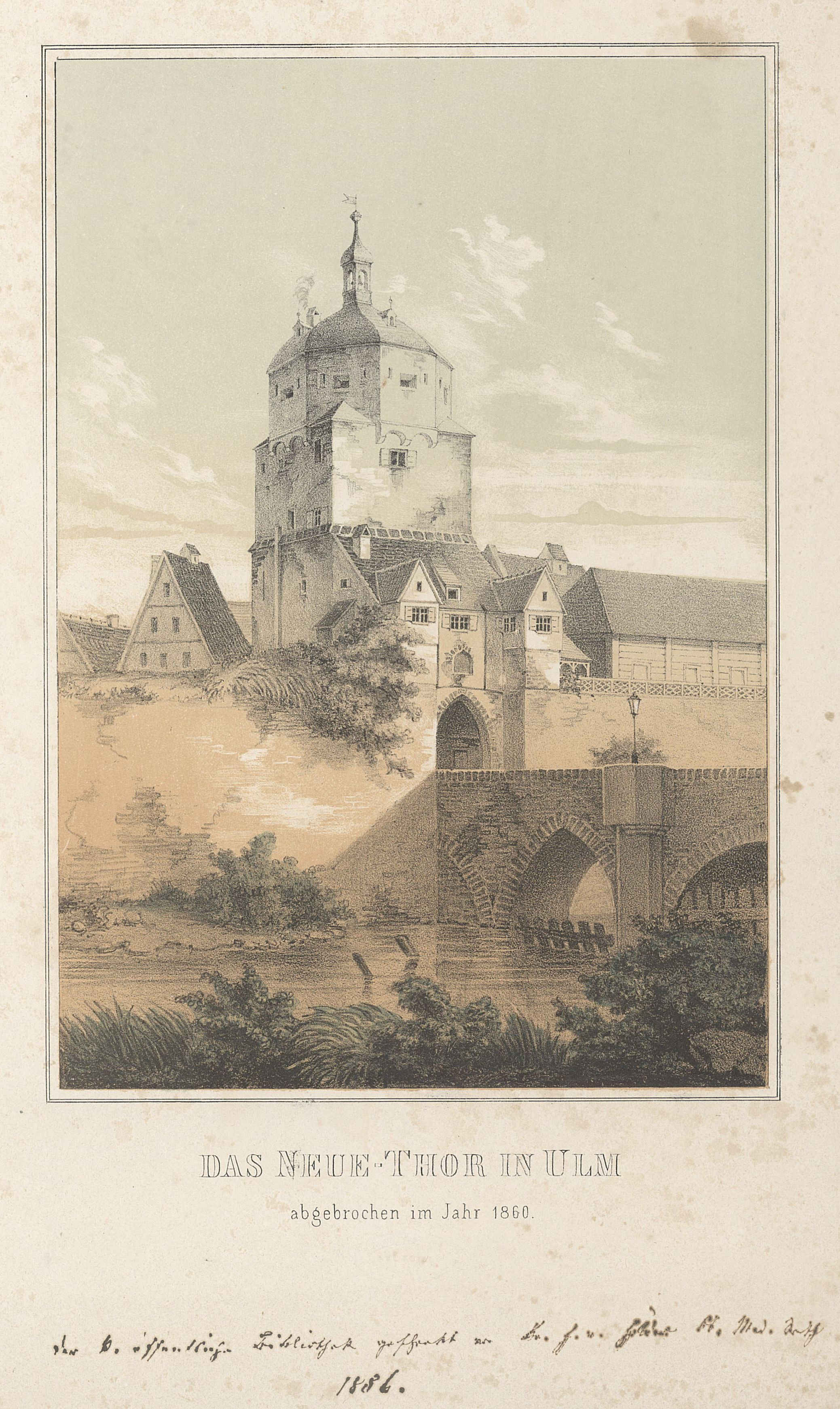 Das Neue Thor in Ulm (Neues Tor, 1860 abgebrochen)